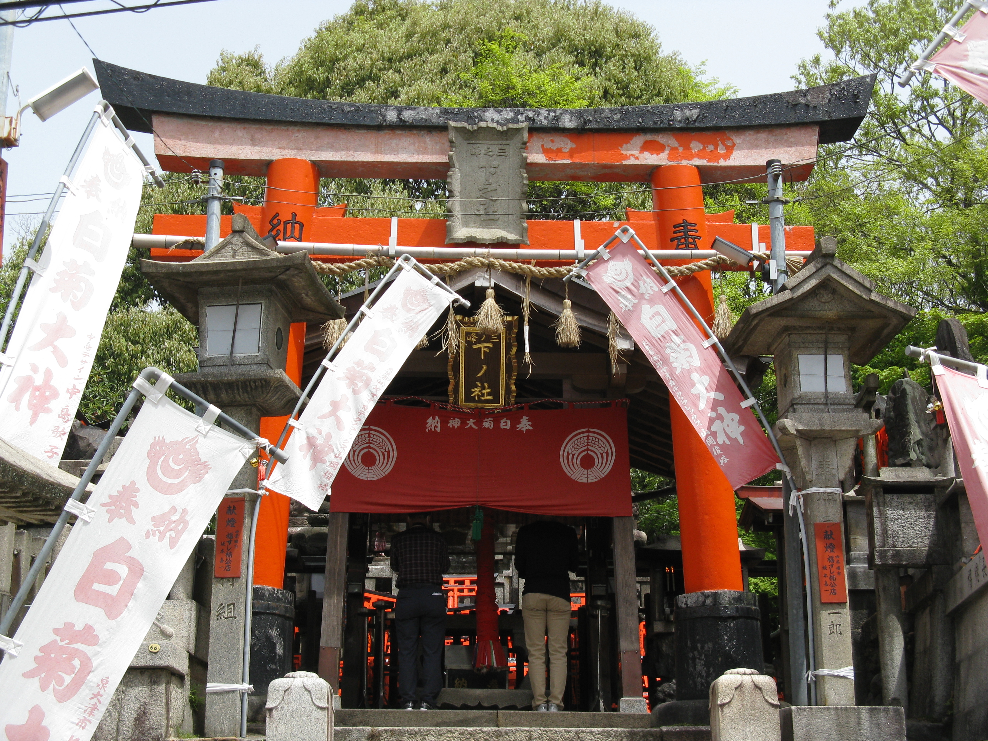 伏見稲荷大社 下ノ社